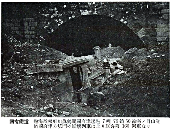 関東大震災によって賽ノ目トンネルに埋まった960形蒸気機関車。土木学会附属土木図書館デジタルアーカイブスで閲覧可能。